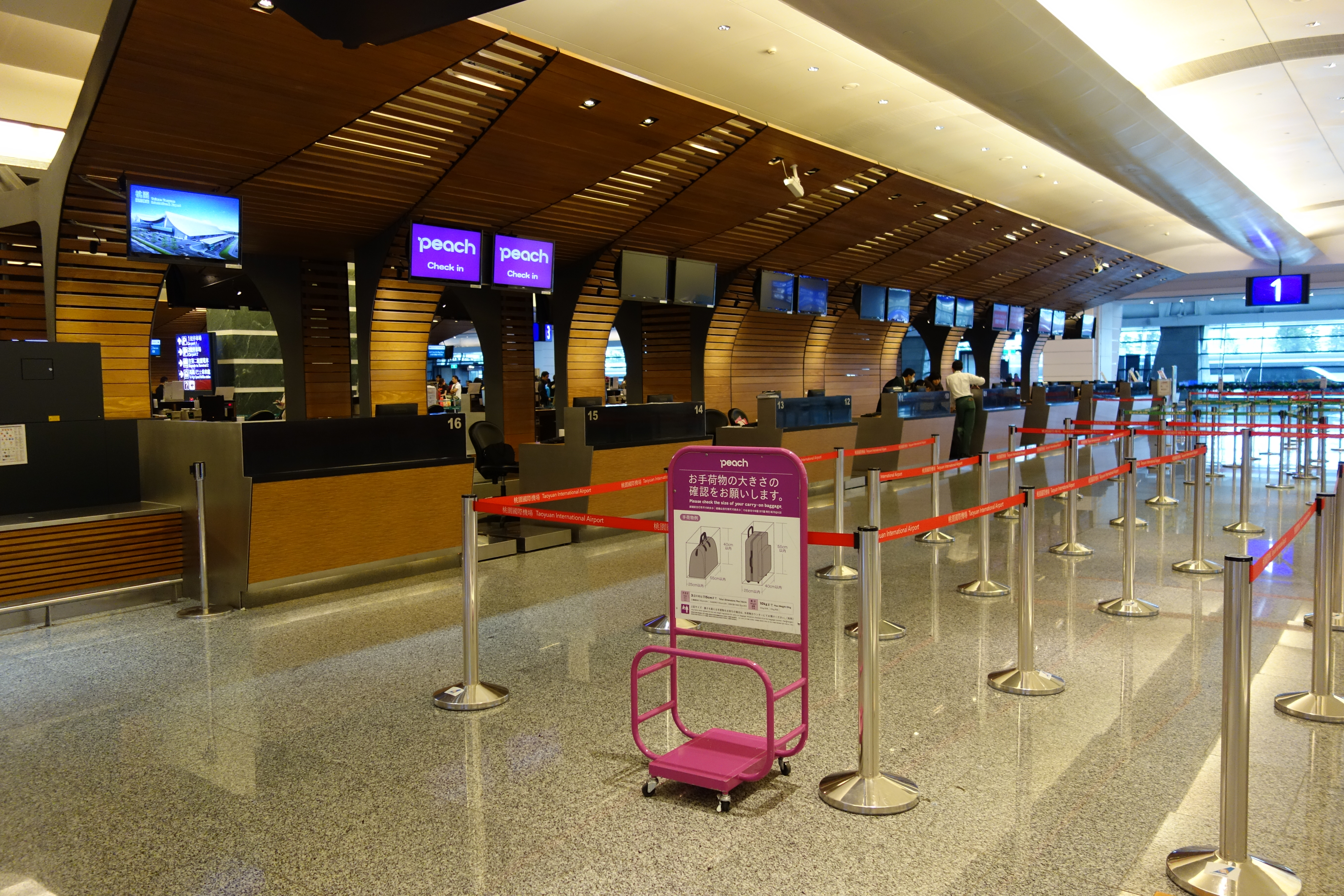 台湾桃園国際空港のPeachカウンター （第1ターミナル1・2・3、Eva Airに委託） ※2013年11月26日までは第2ターミナルを使用 第2ターミナル使用時（8A、Eva Airに委託）